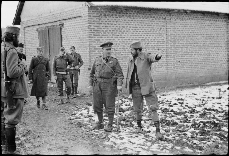 Britanski brigadni Čarls Armstrong obilazi počasnu jedinicu 2. ravnogorskog korpusa u okolini Čačka krajem 1943. godine. Sa Armstrongove leve strane je komandant 2. ravnogorskog korpusa kapetan Predrag Raković.